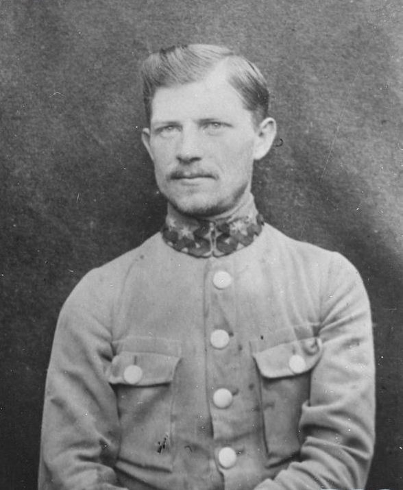 Jan Hajec, porucznik Legionów Polskich (1. pp oraz 5. pp). Przed I wojną światową członek Sokoła. Poległ 4 VII 1916 r. podczas bitwy pod Kostiuchnówką, dowodząc batalionem po śmierci mjr. Stanisława Sława-Zwierzyńskiego. Pośmiertnie odznaczony KN, VM 5 klasy, Polonią Restituta, Złotym KZ.